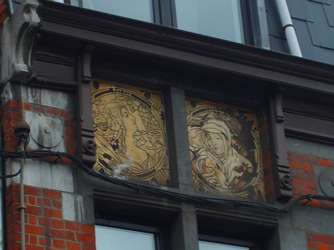 Maison Moonen Liège rue du Laveu, 28 Art nouveau arch. Victor Rogister, 1903